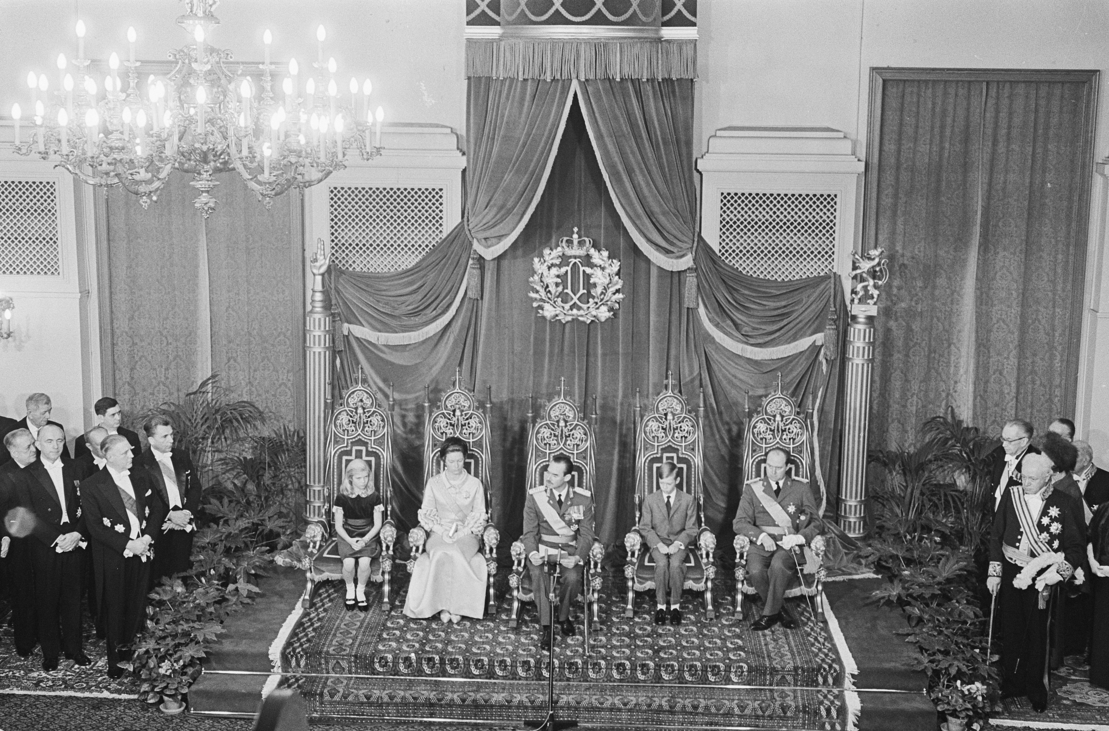 Collectie / Archief : Fotocollectie Anefo Reportage / Serie : [ onbekend ] Beschrijving : De troonwisseling in Luxemburg, Hertogelijke familie op de troon Datum : 12 november 1964 Locatie : Luxemburg Trefwoorden : families, troonwisselingen Fotograaf : Pot, Harry / Anefo Auteursrechthebbende : Nationaal Archief Materiaalsoort : Negatief (zwart/wit) Nummer archiefinventaris : bekijk toegang 2.24.01.05 Bestanddeelnummer : 917-1209